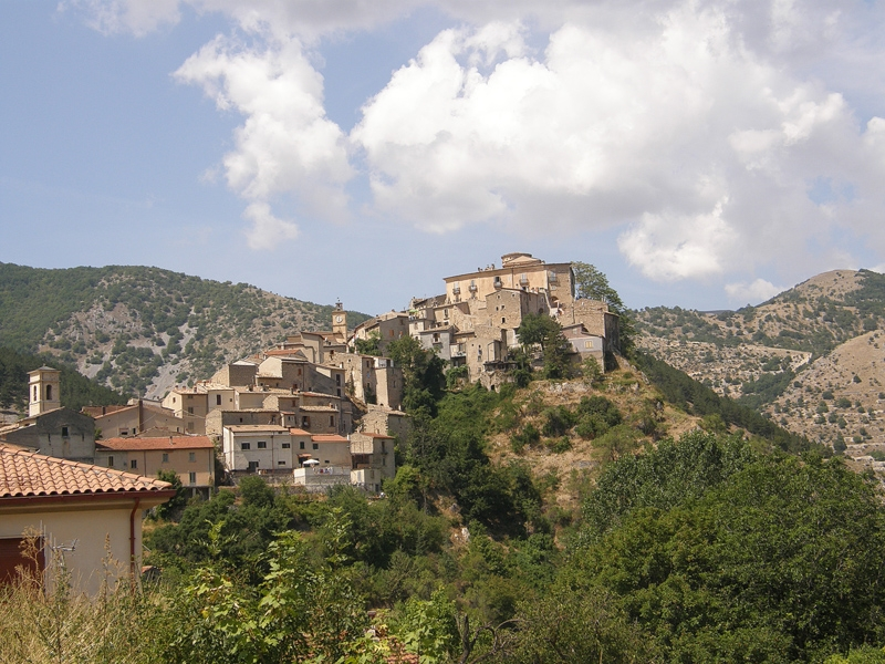 Villalago 2009